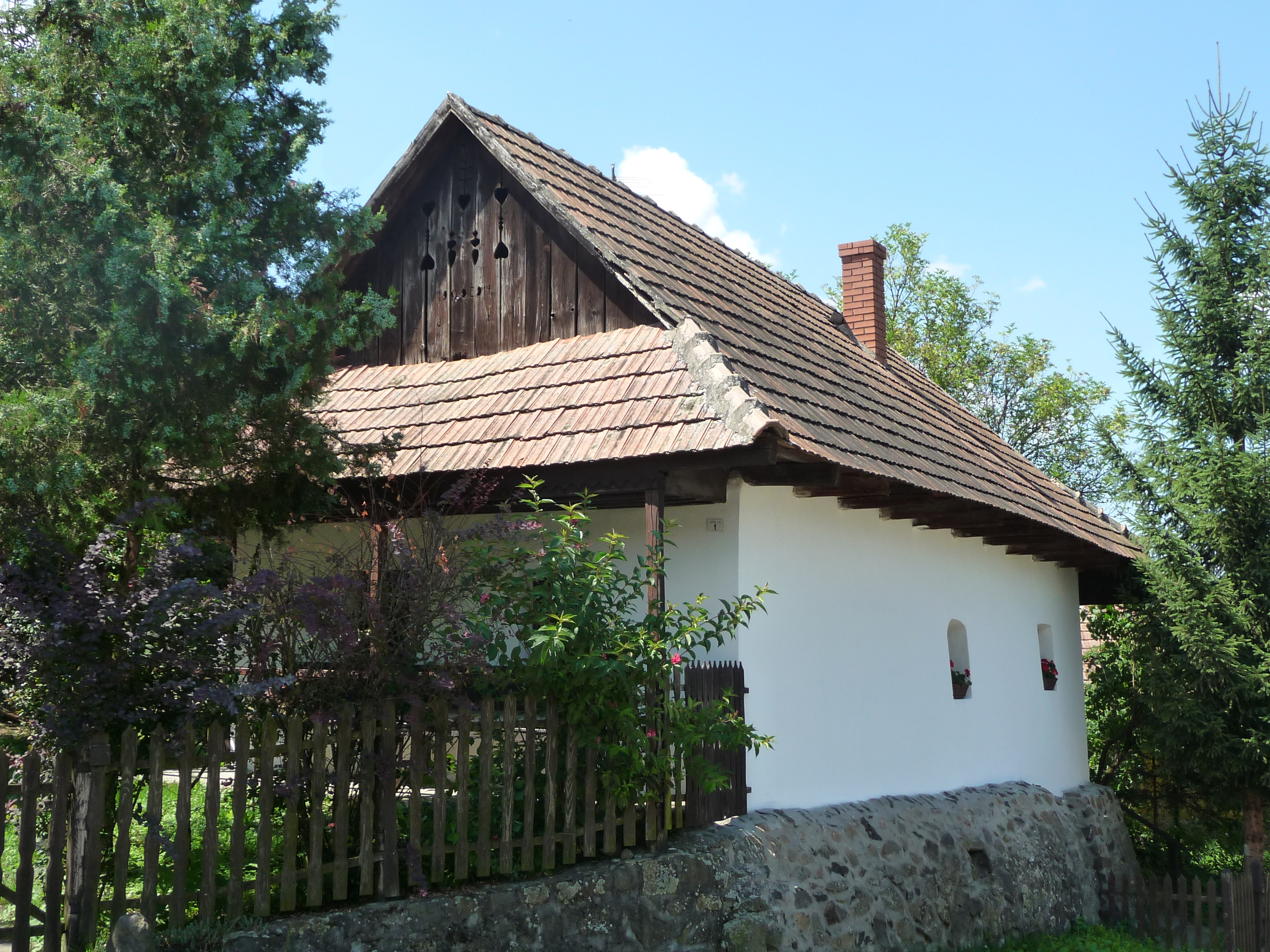 Hollókő, Petőfi u. 1.